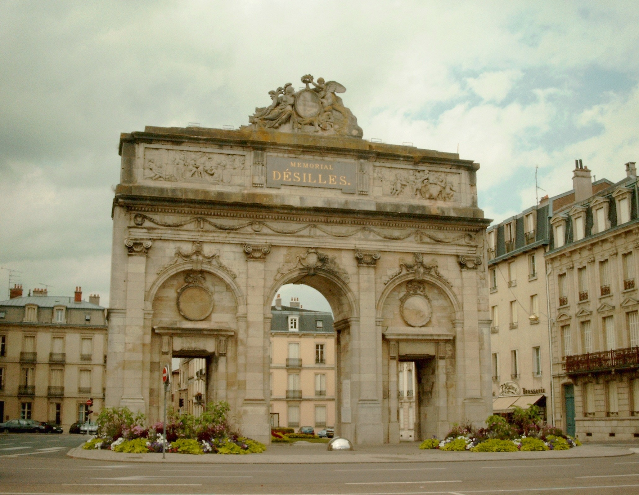 La porte et mémorial Désilles à Nancy